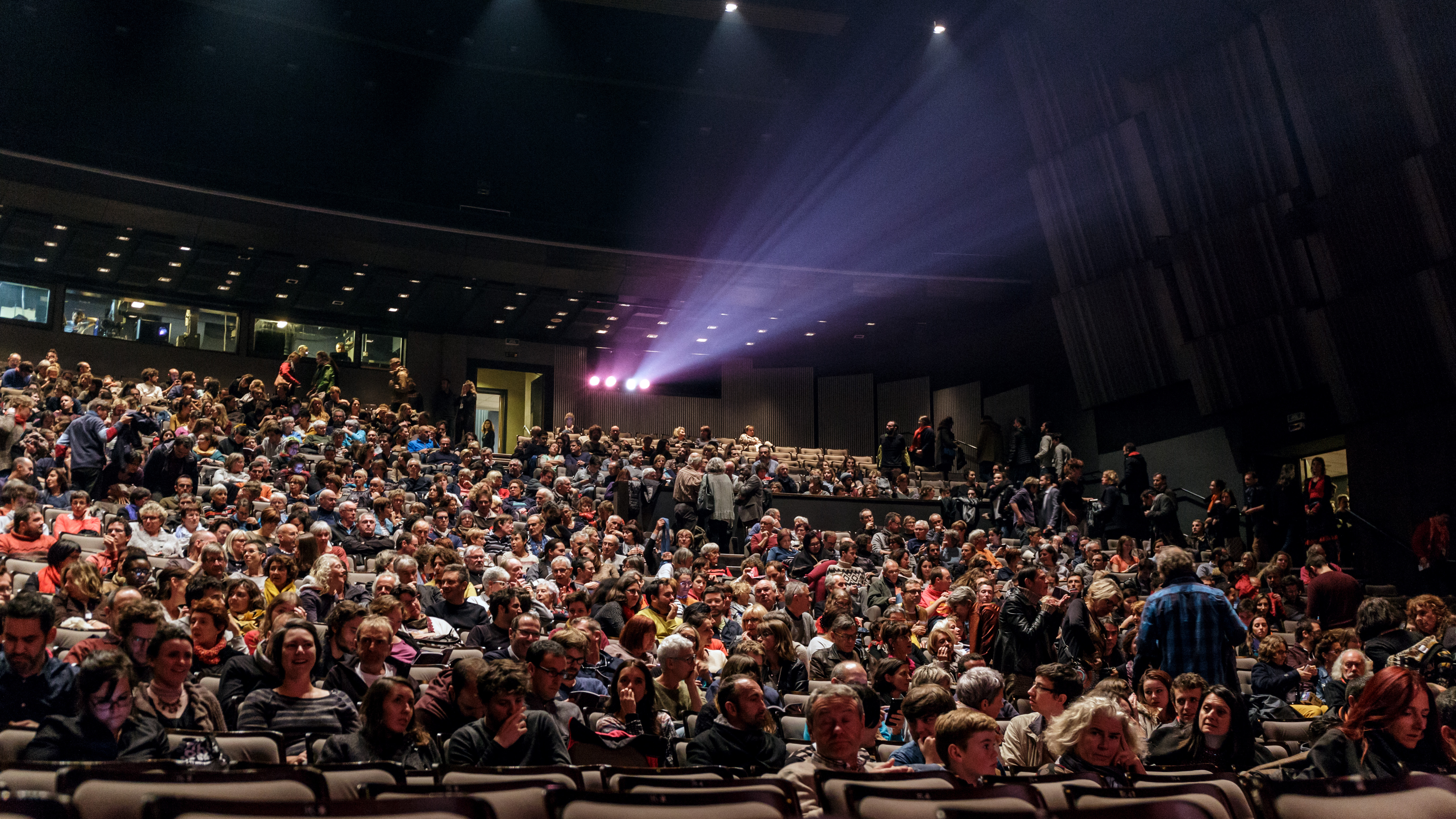 Soirée d'ouverture dédiée aux extra-terrestres lors du Festival européen du film court de Brest au Quartz le mardi 8 novembre 2016.